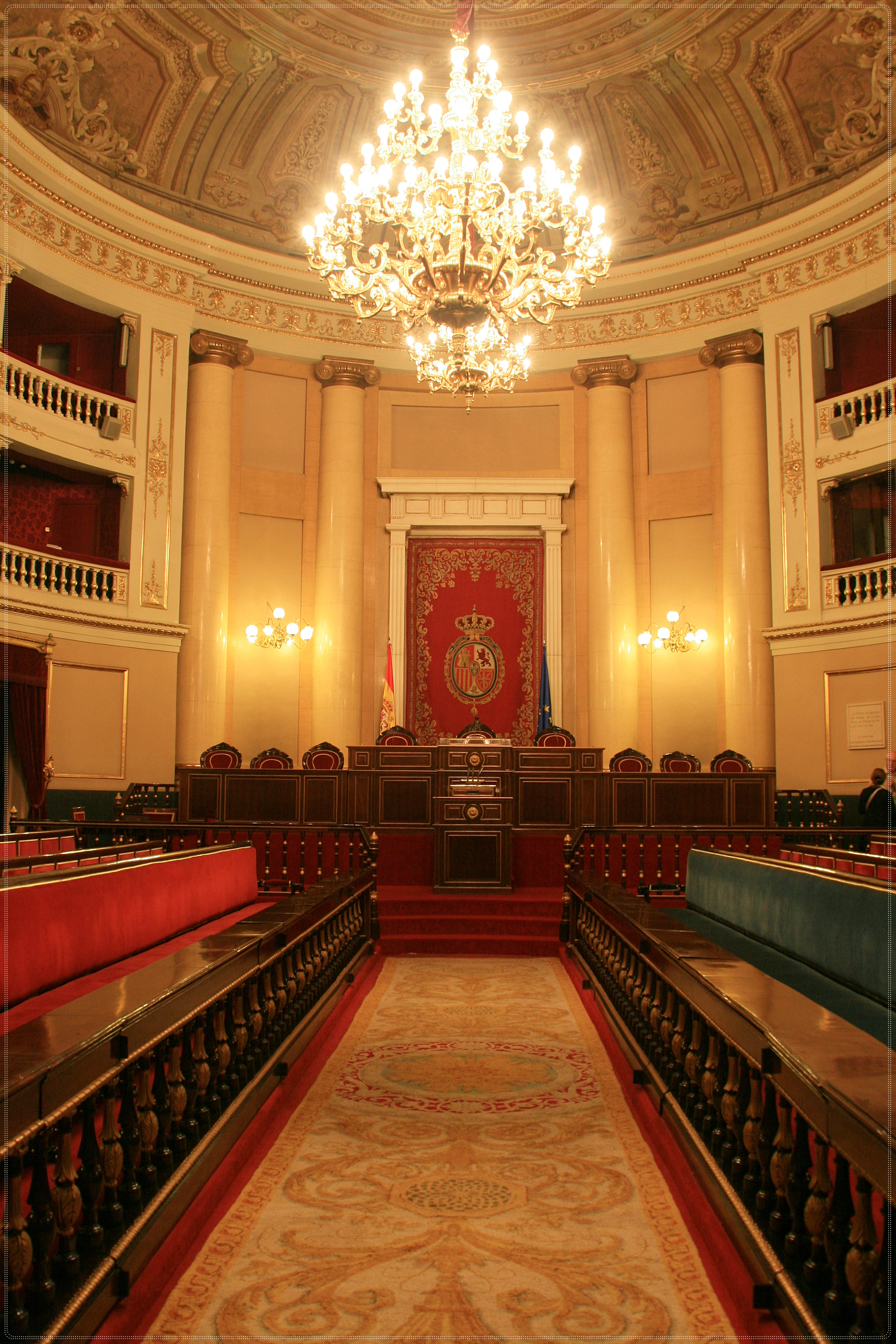 Sede del Senado español desde 1835, en principio fue construido para albergar una comunidad de frailes agustinos. Su autoría se debe a Francisco de Montalbán, siguiendo el diseño de Juan de Valencia y Fernando de Mora. Su fachada es neoclásica, estructurada en un cuerpo al que se adosan cuatro pilastras. El interior es también de factura neoclásica, al estilo griego, y cuenta con una excelente biblioteca y salas, en las que se puede apreciar un monumental conjunto de obras pictóricas, sin duda una de las mejores colecciones de pintura española del siglo XIX.